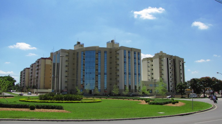 Edificios residenciais e comerciais em Paulínia-SP